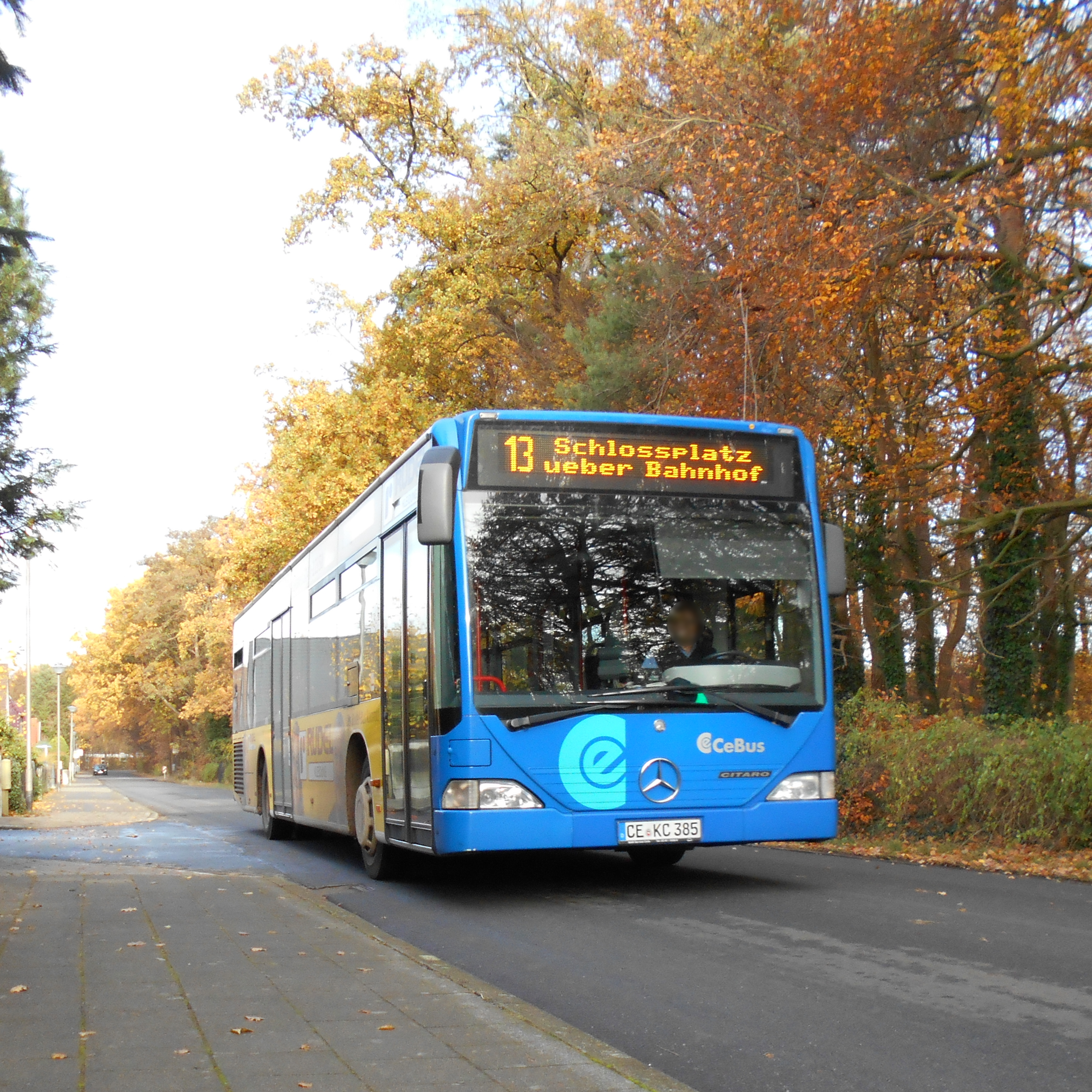 Ein Citaro o530 der CeBus. Bus 385 auf der 13 am 14.11.2018.